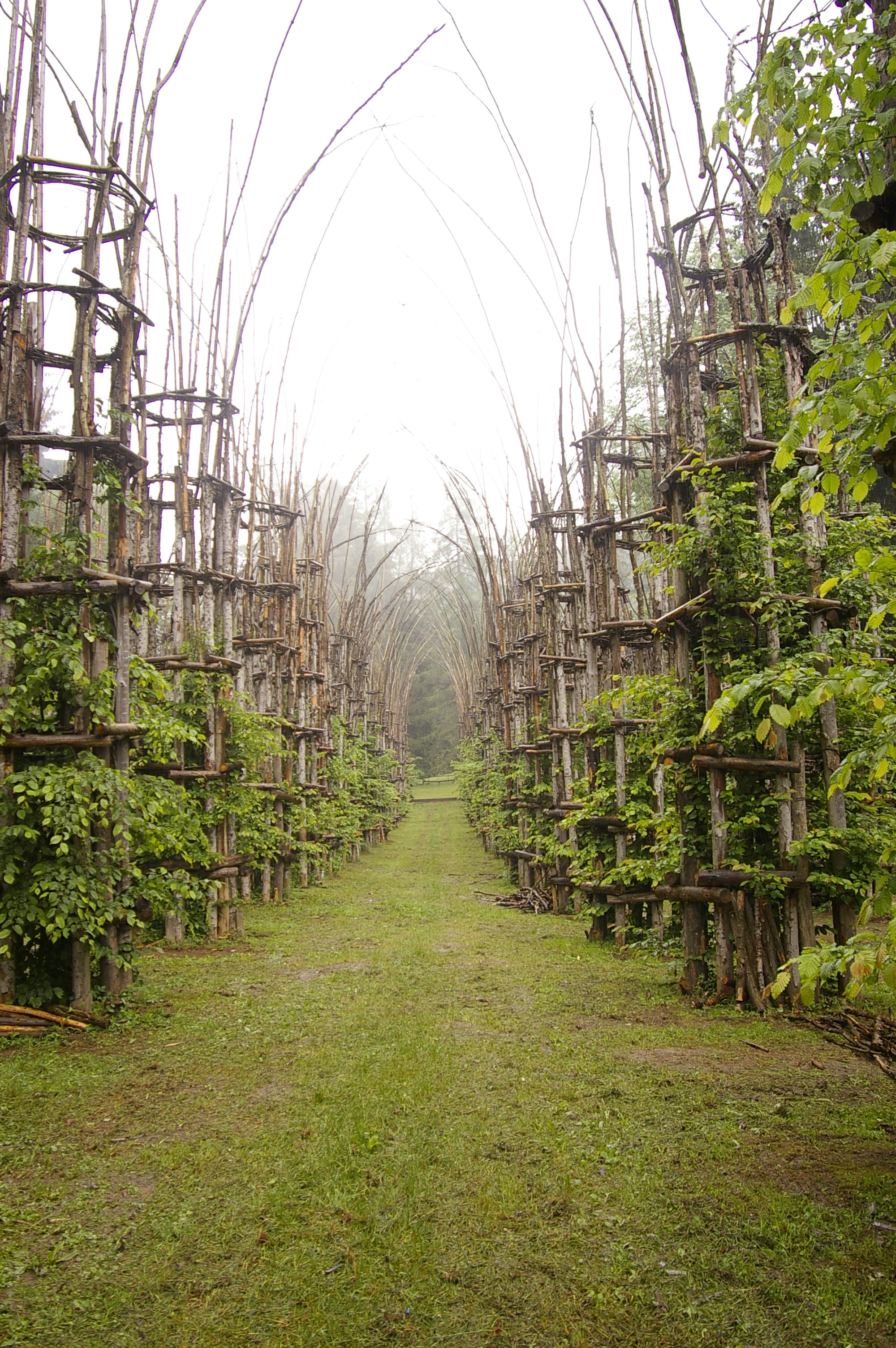 Arte Sella "Cattedrale Vegetale" di Giuliano Mauri, 2002. ubicata nei pressi di Malga Costa, realizzata con artifici naturali che indirizzano la crescita delle piante, le piante crescono circa 50cm l'anno, quando gl'alberi saranno indipendenti gli artifici marciranno. dimensioni: d tre navate formate da ottanta colonne di rami intrecciati, altezza 12 metri con tronco di diametro 1 metro; rettangolo di base di 82 metri per 15, un' altezza di 12 metri e copre un' area di 1.230 metri quadrati.